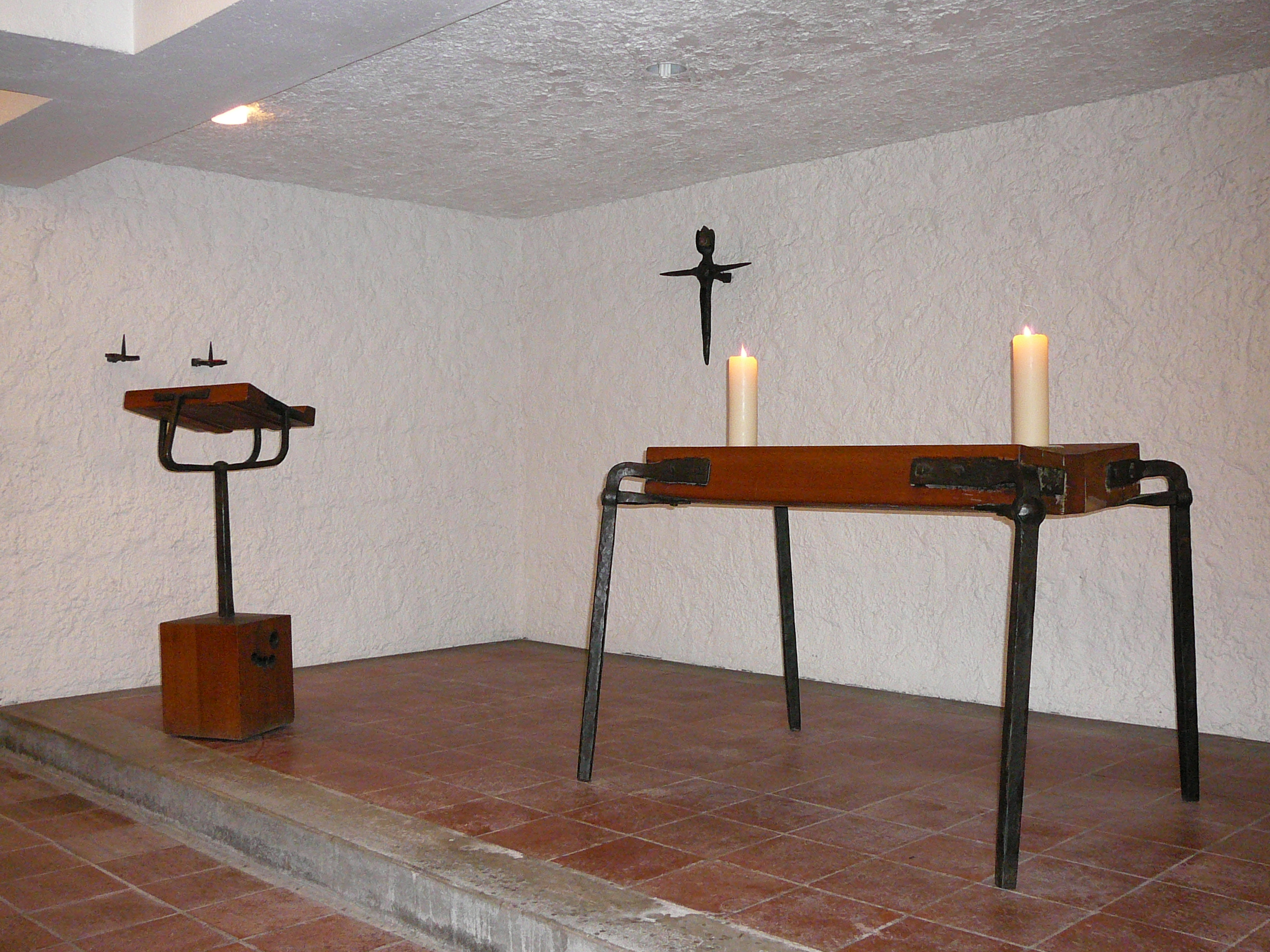 Römisch-katholische Pfarrkirche Bruder Klaus Zürich-Unterstrass, Krypta von Hans Christen